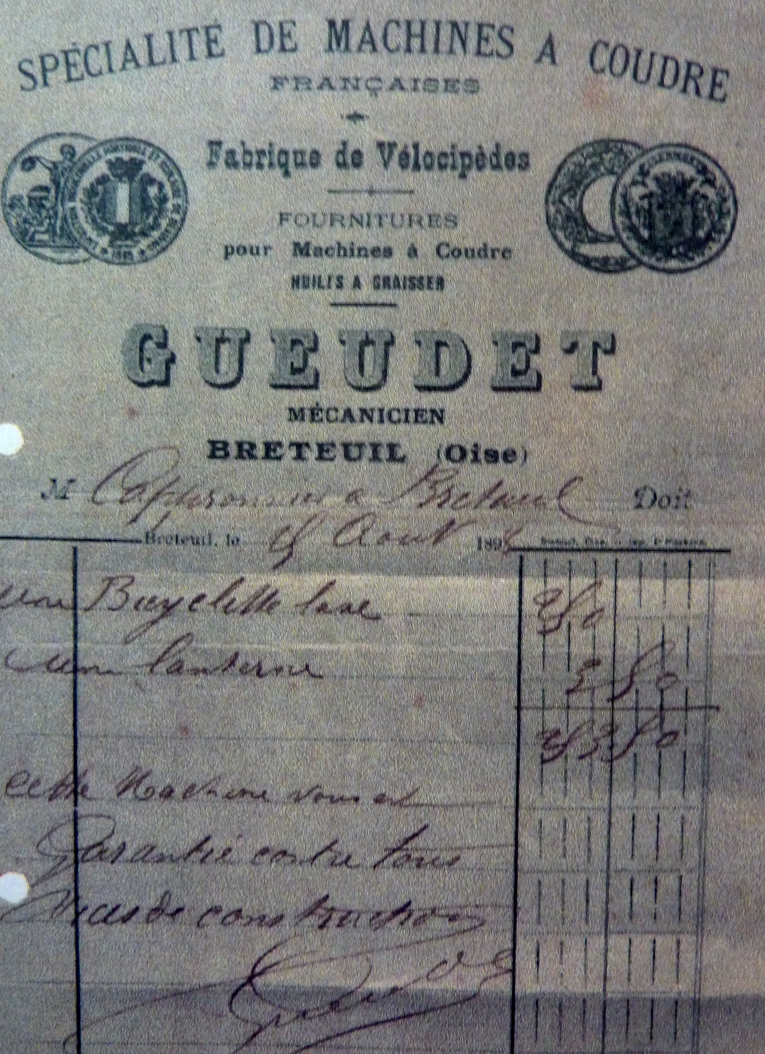 Fabrique de vélos Gueudet